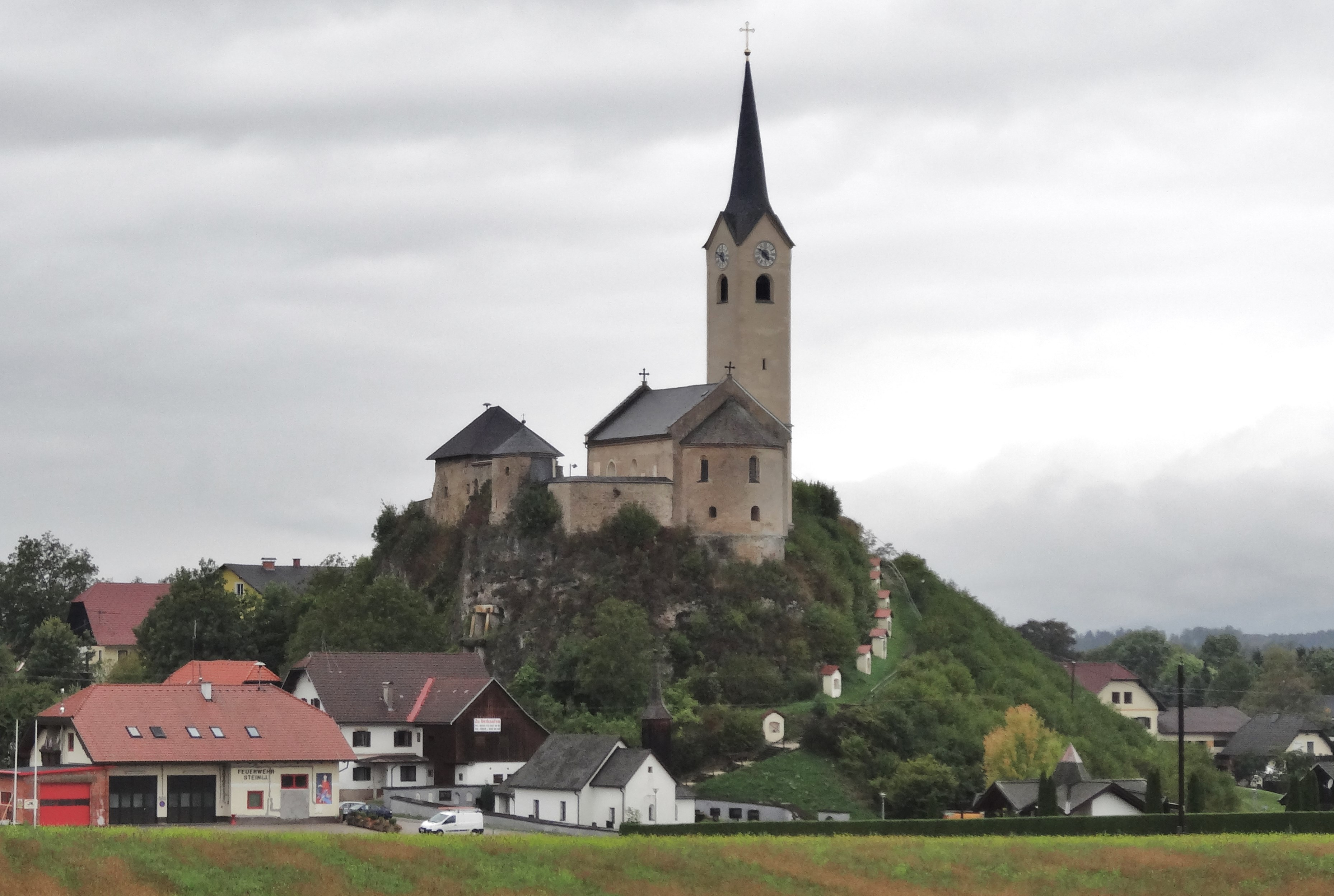 Das Kirchenensemble in Stein im Jauntal. Übersicht mit Friedhofskirche, Kärntner Kreuzweg und Pfarrkirche Dieses Bild wurde anlässlich des österreichischen Tags des Denkmals 2013 in Kärnten eingereicht.